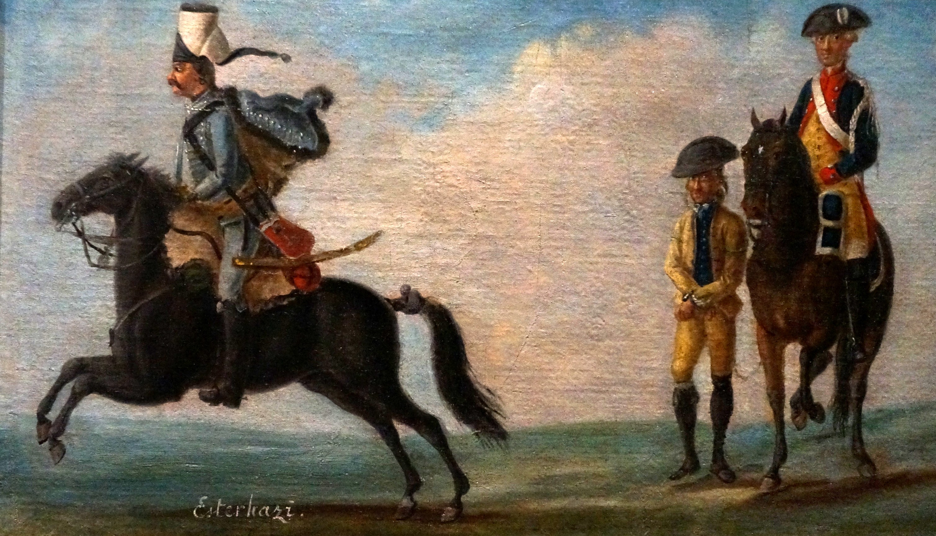 Peinture présentée au musée d el'armée.